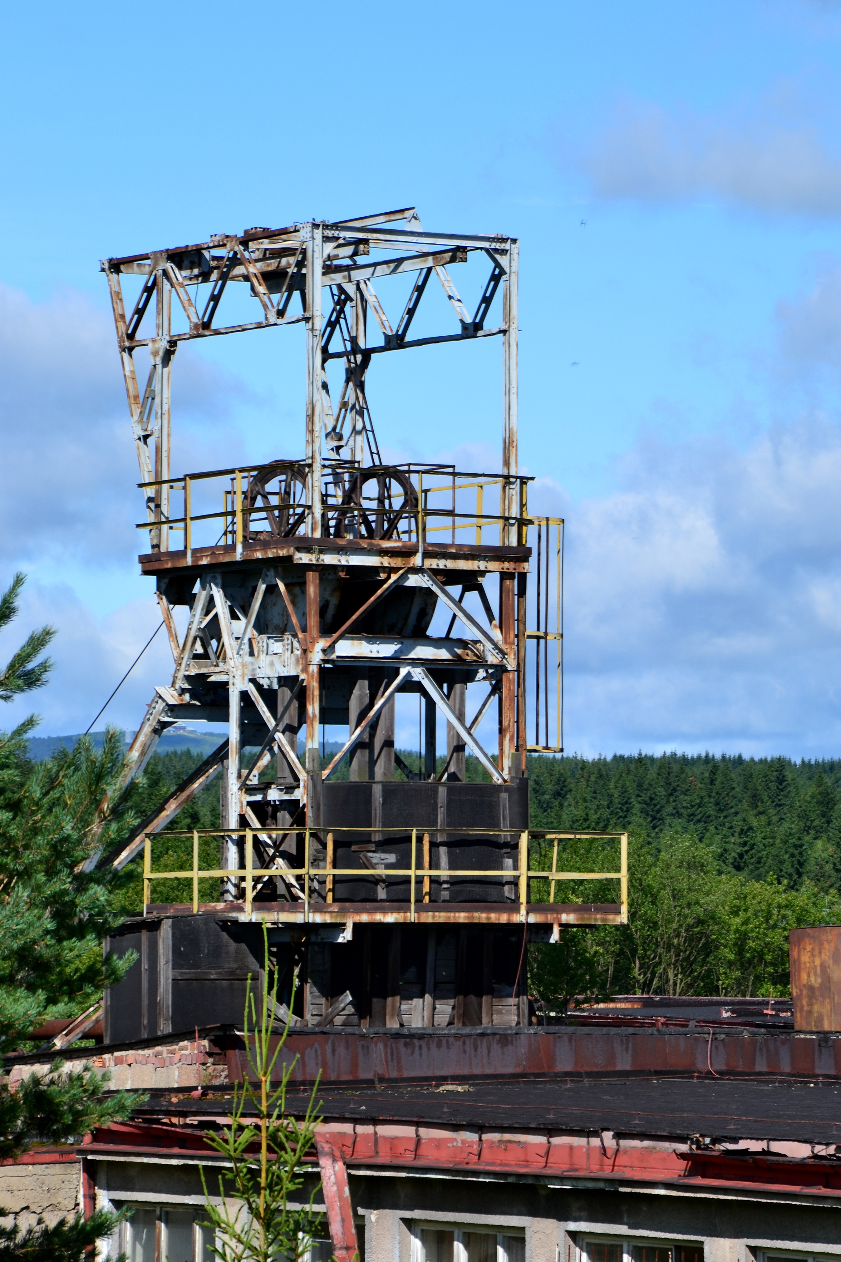 Důl Měděnec – ocelová těžní věž pro fárání mužstva